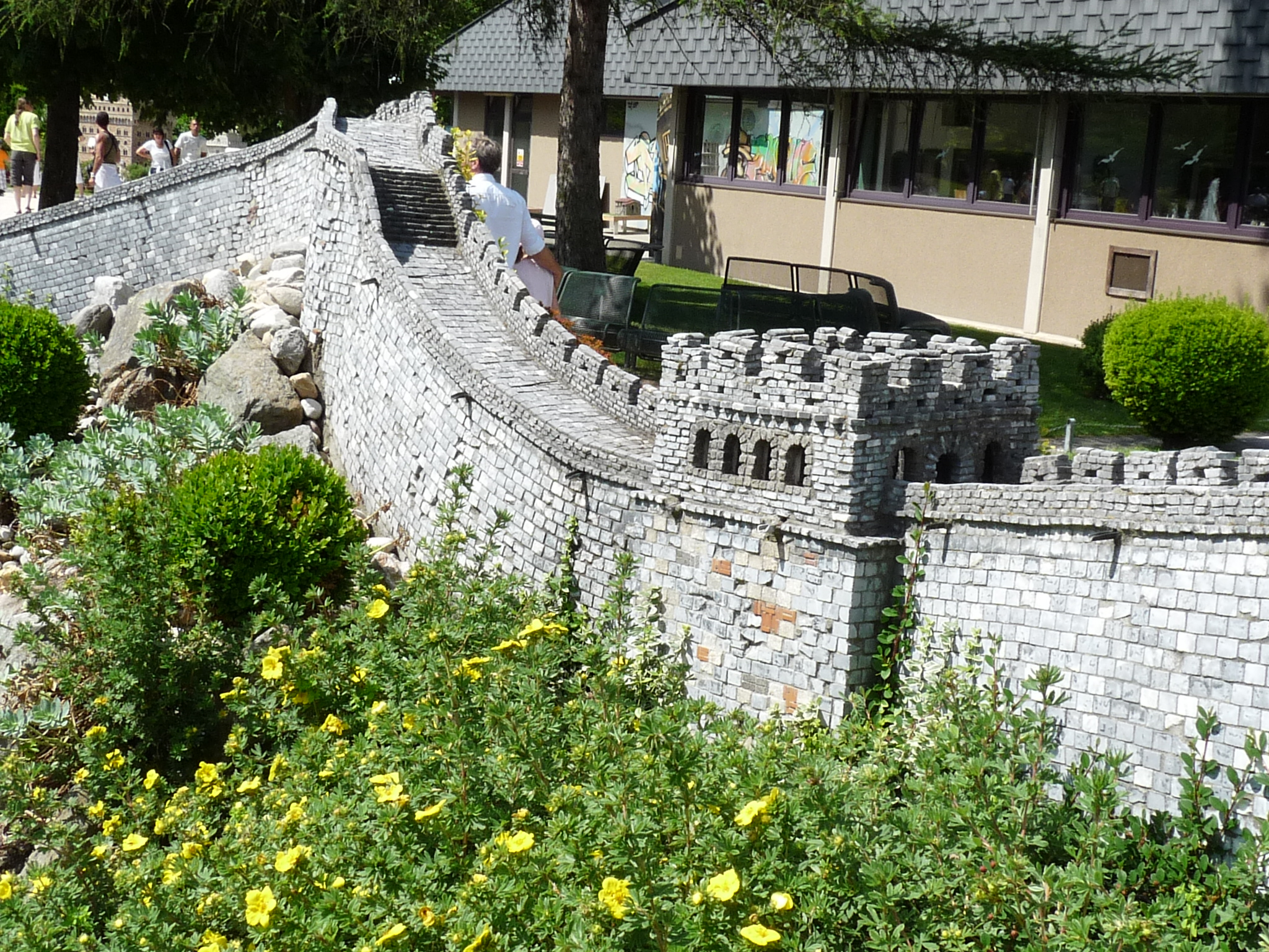 Minimundus Klagenfurt, Chinesische Mauer